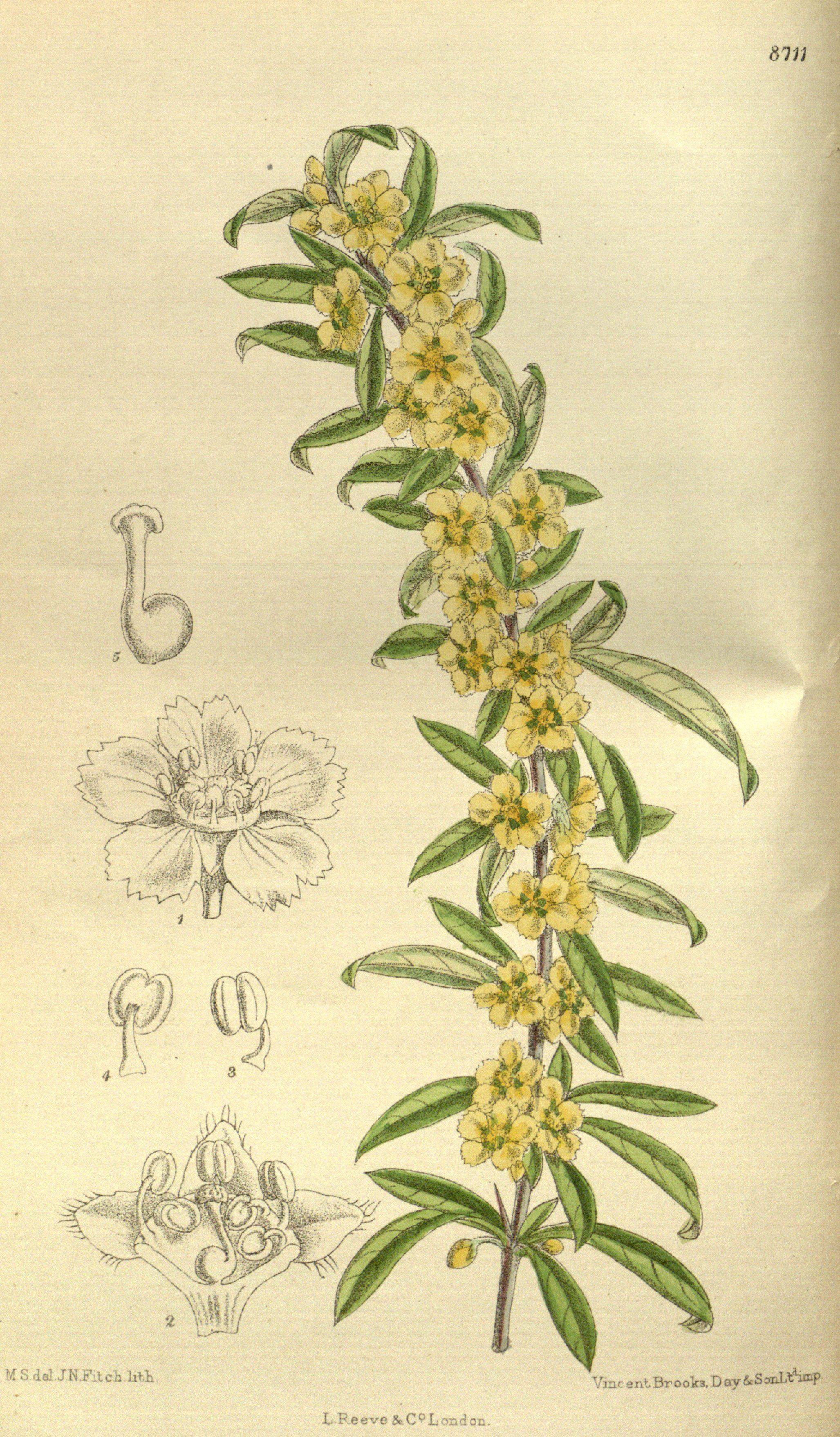 Plagiospermum sinense (=Prinsepia sinensis), f. brachypoda, Rosaceae